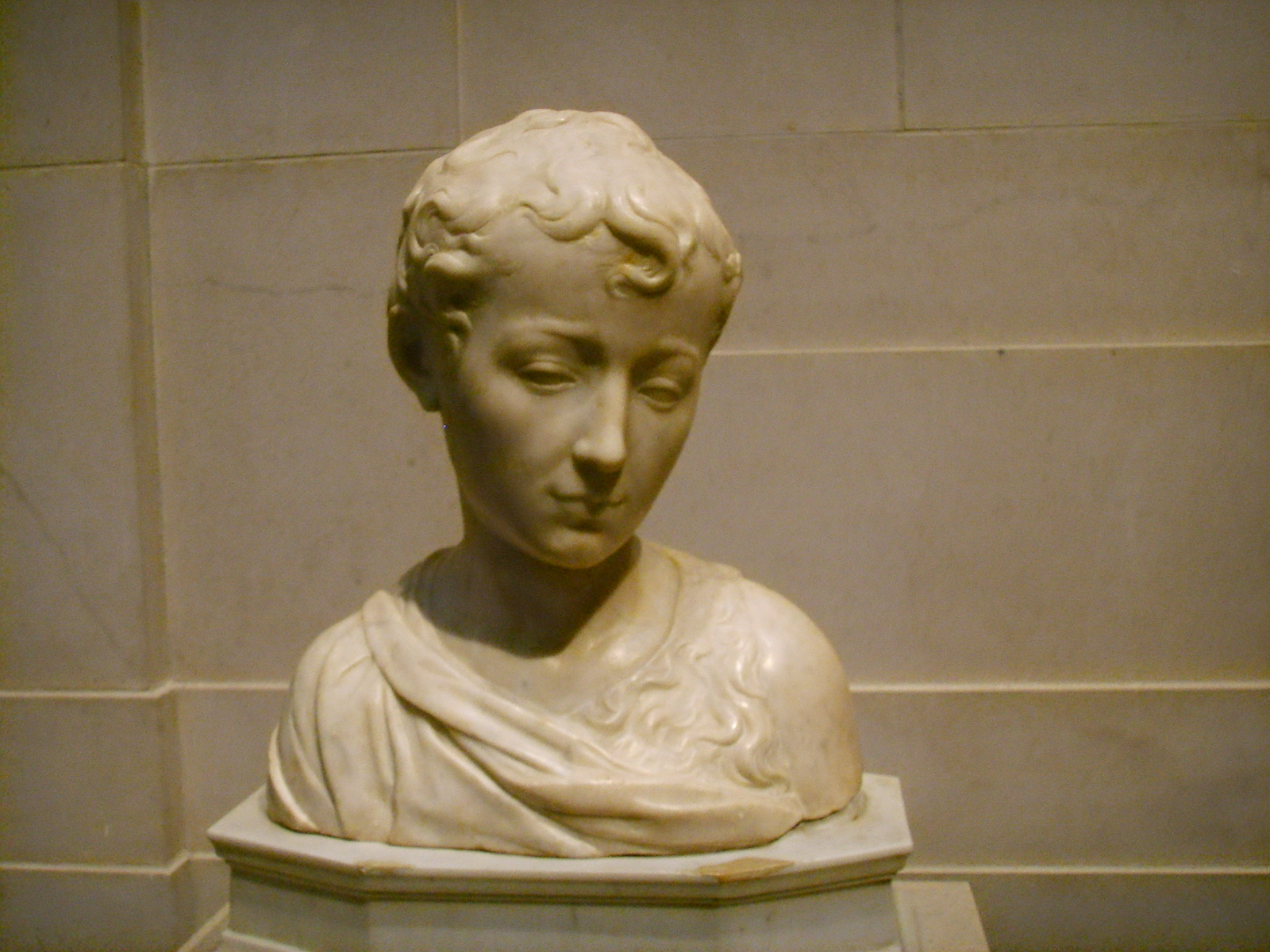 Marmorbüste